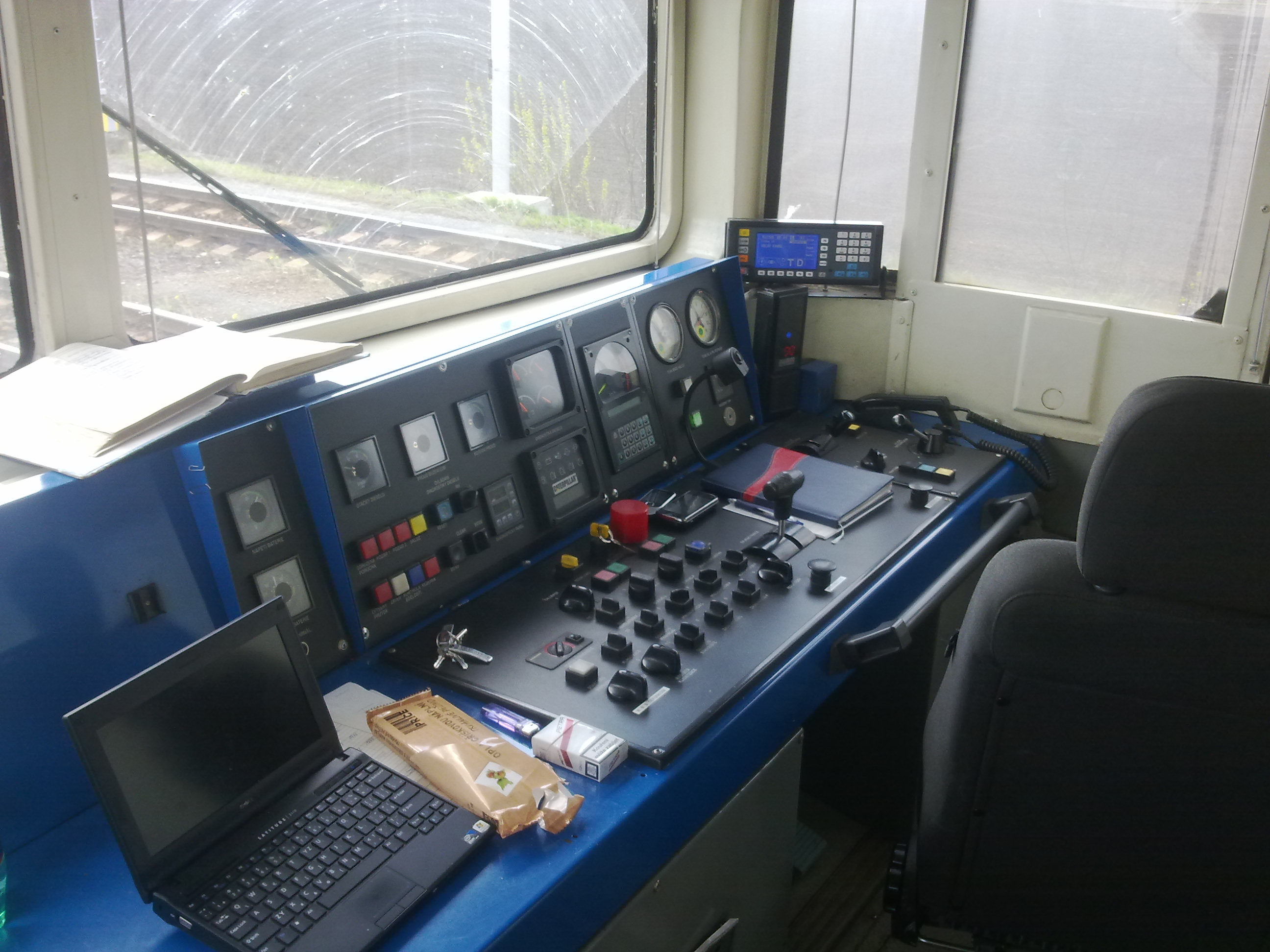 Stanoviště strojvedoucího na lokomotivě 753 dopravce AWT.